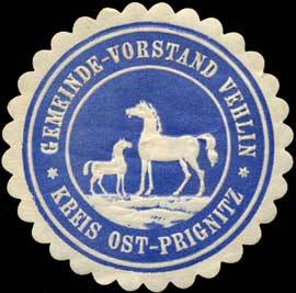 Sealing stamp Title: Gemeinde-Vorstand Vehlin - Kreis Ost-Prignitz Description: Pferde, blau, weiß, geprägt Place: Vehlin size: 4 cm